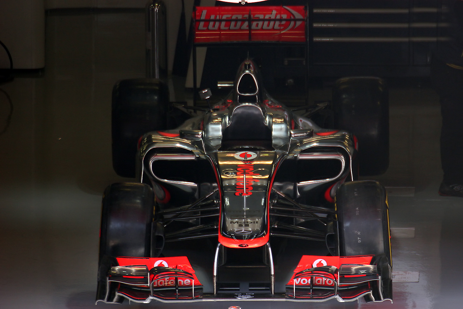 F1 Tests - Circuit de Catalunya, Spain.